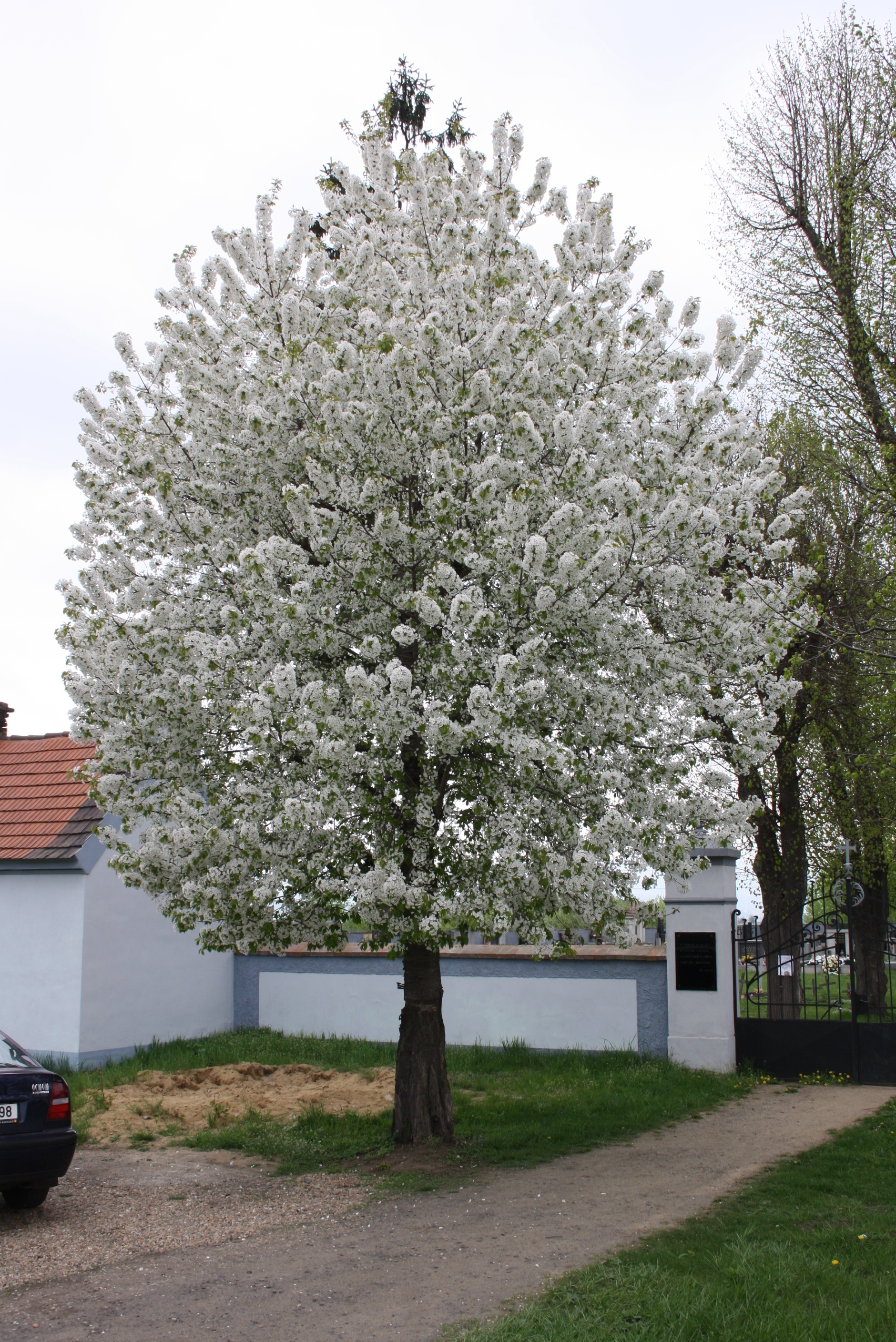 Prvomájová rozkvetlá třešeň u keblického hřbitova.